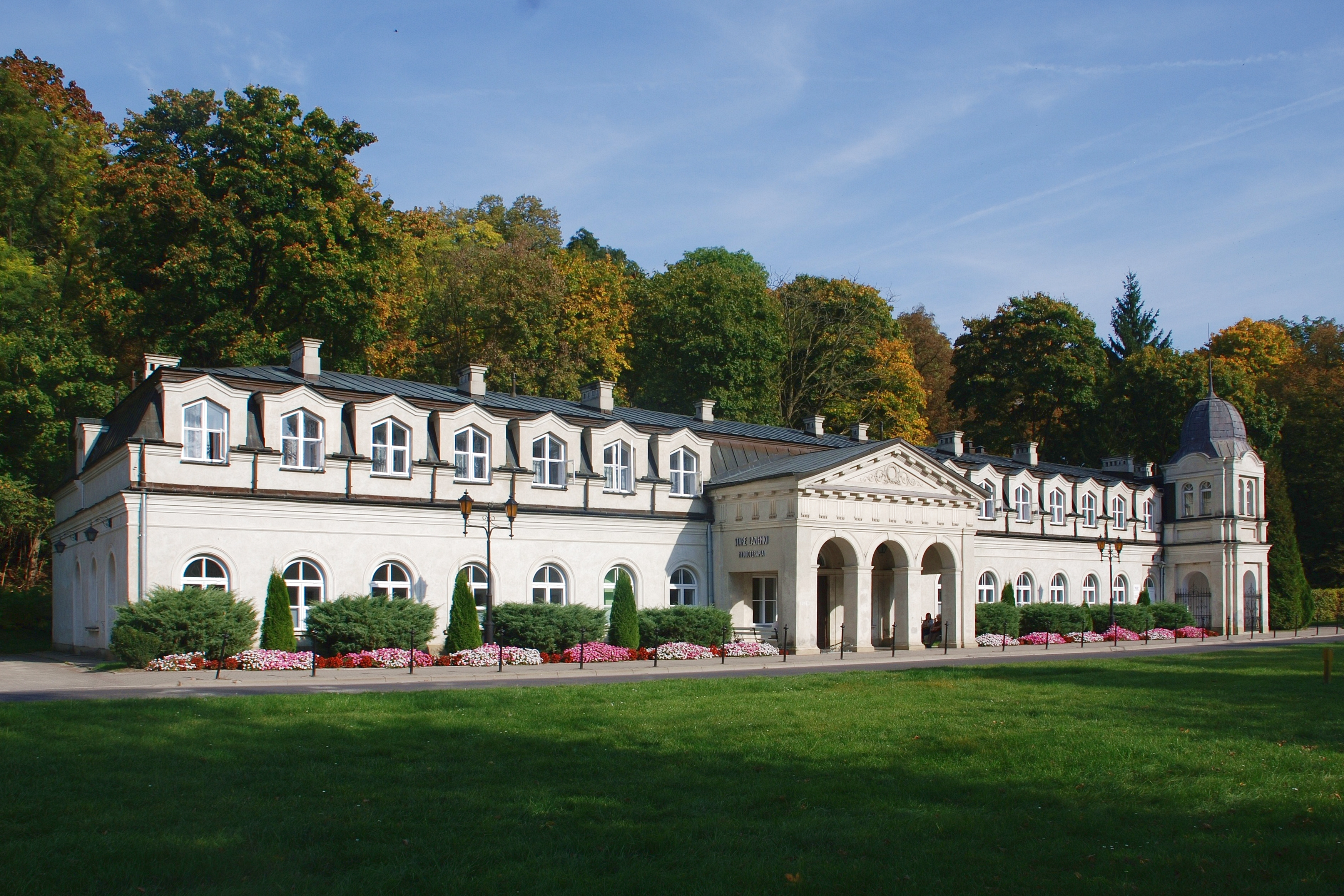 miasto Nałęczów